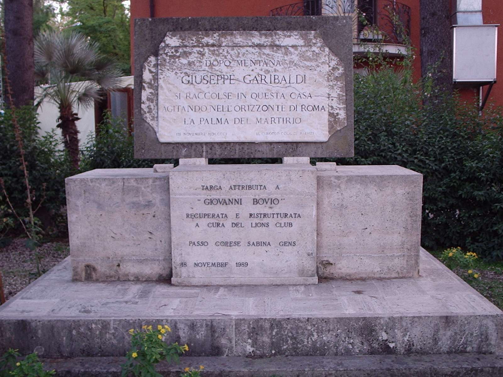 Targa commemorativa del passaggio di Giuseppe Garibaldi a Passo Corese